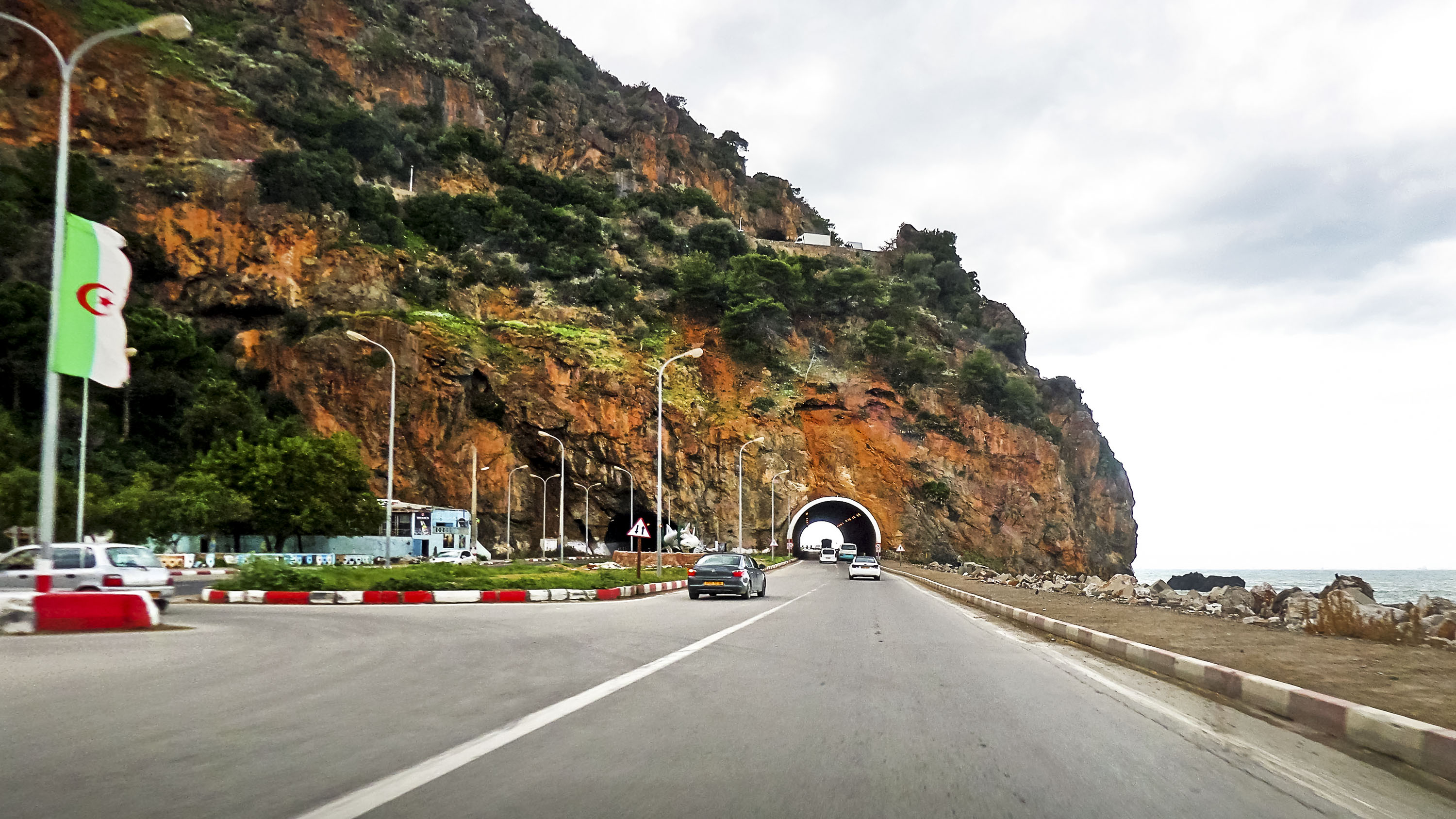 Aokas اوقاس